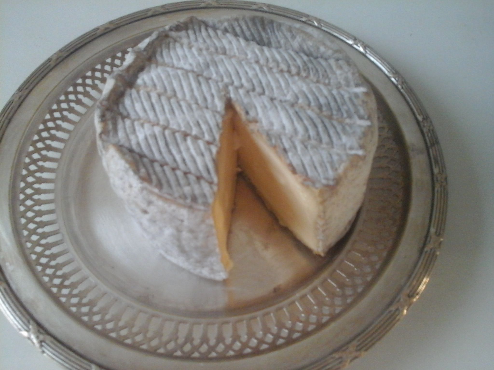 Tomme Fruitée Le Rustique.